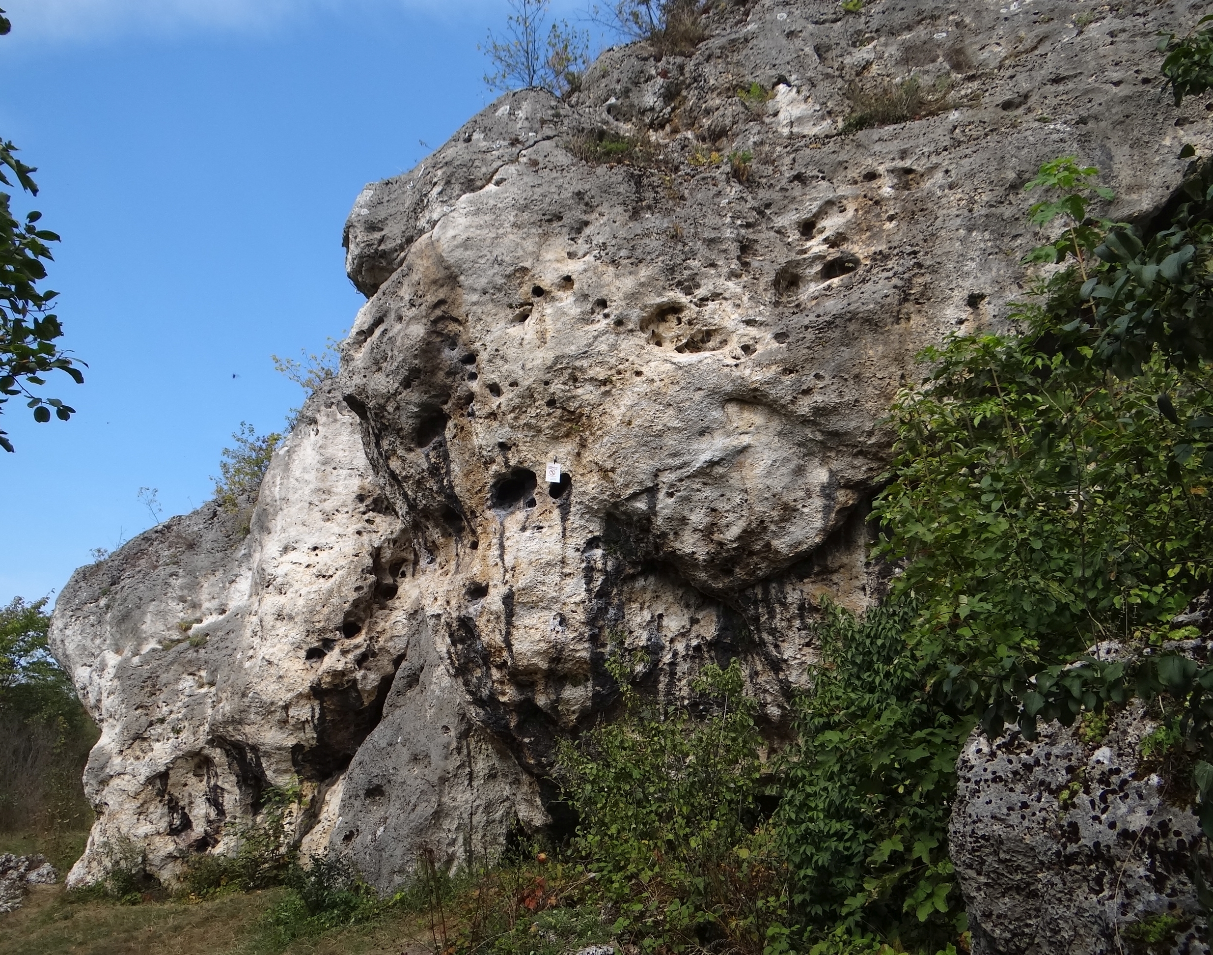 Skała Słoń w Łutowcu